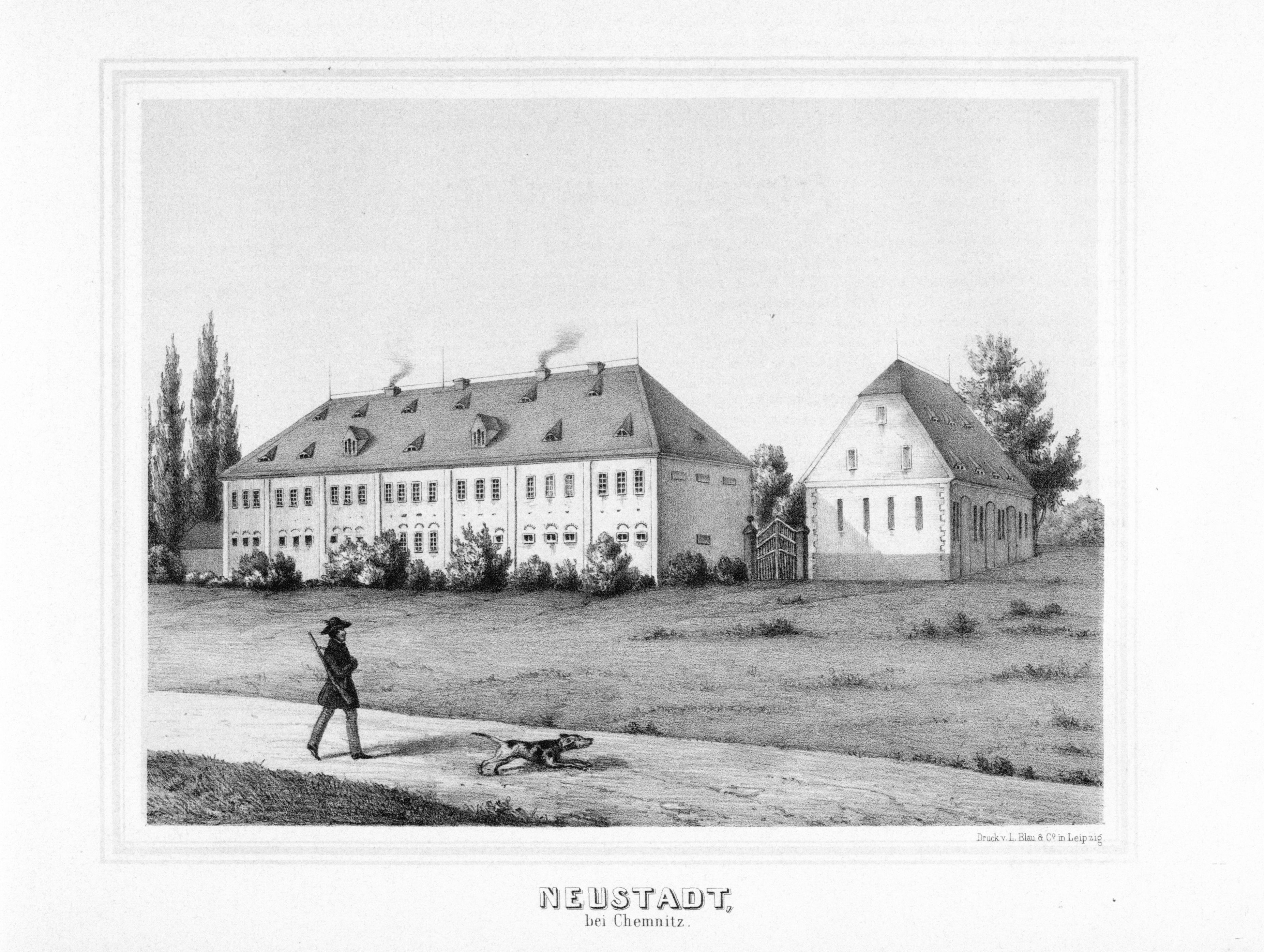 Chemnitz-Neustadt aus: Album der Rittergüter und Schlösser im Königreiche Sachsen Erzgebirgischer Kreis Section: IV